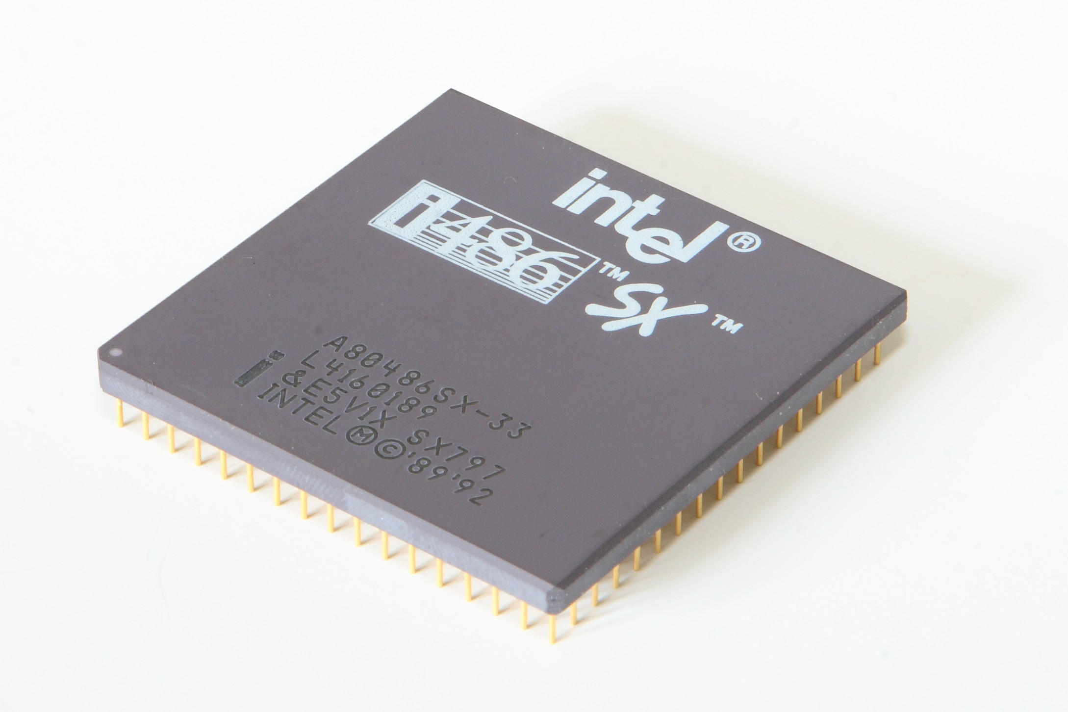 Intel i486 SX 33MHz